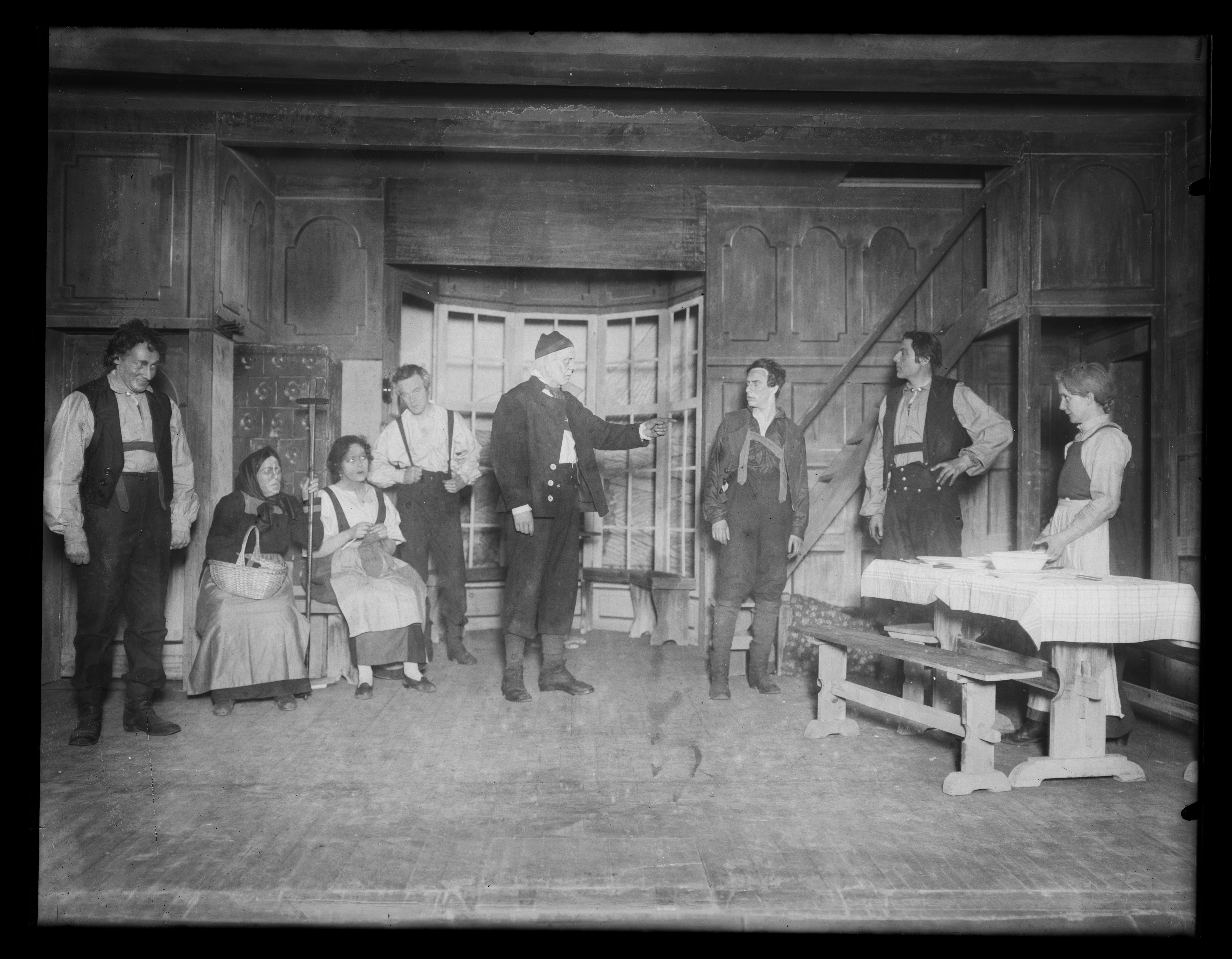 Bildet er hentet fra Nasjonalbibliotekets bildesamling